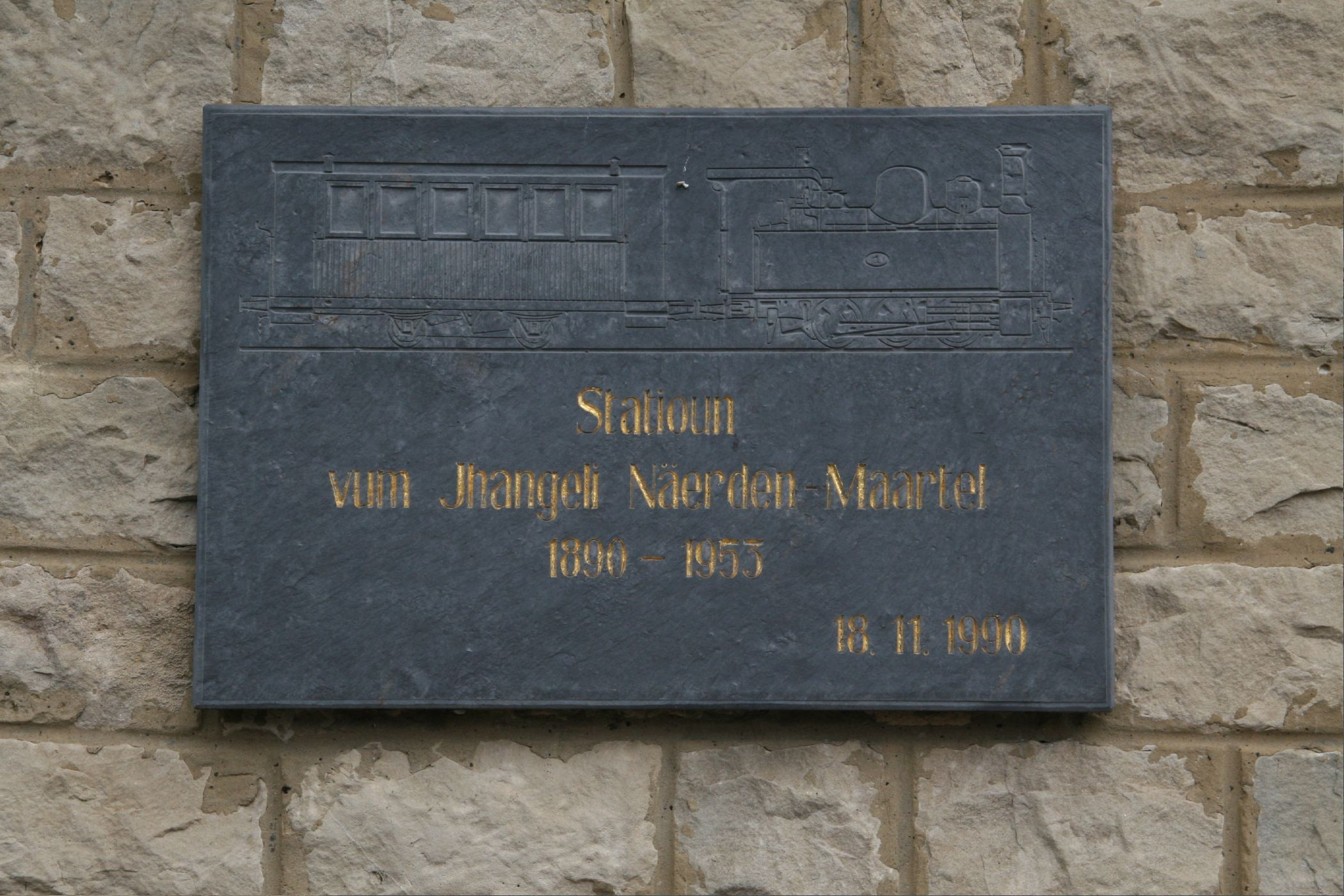 Sujet:Erënnerungsplaque op der Gare zu Nidderpallen. 11.04.2008 Auteur:User:PlayMistyForMe